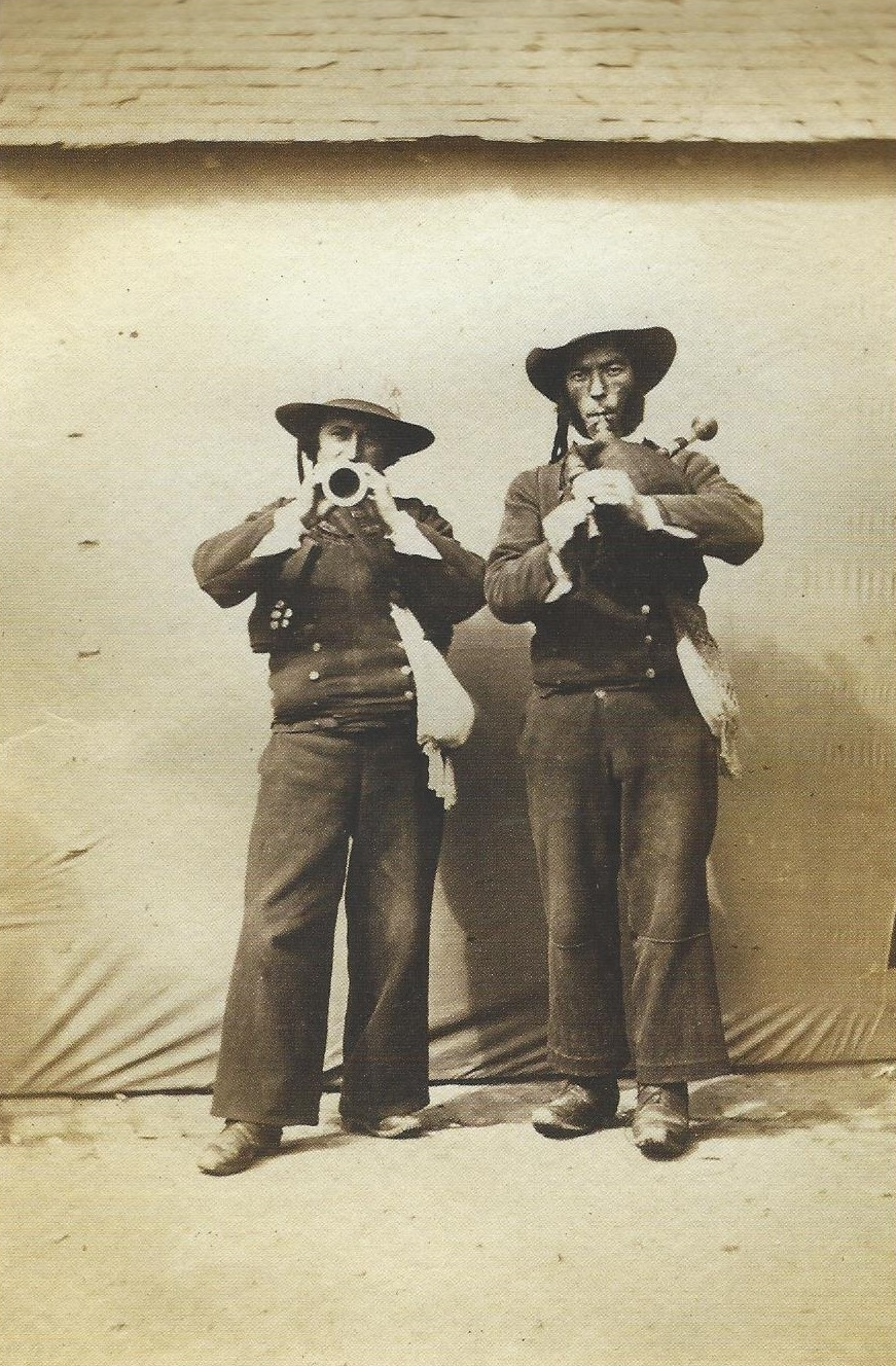 Plogastel-Saint-Germain : Pierre et François Quiniou, deux sonneurs jouant l'un la bombarde, l'autre le biniou. Ces deux sonneurs ont notamment joué lors du bal donné à Quimper en l'honneur de Napoléon III le 12 août 1858.